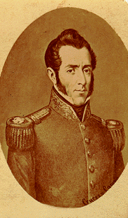 Miguel Barragán, President of Mexico